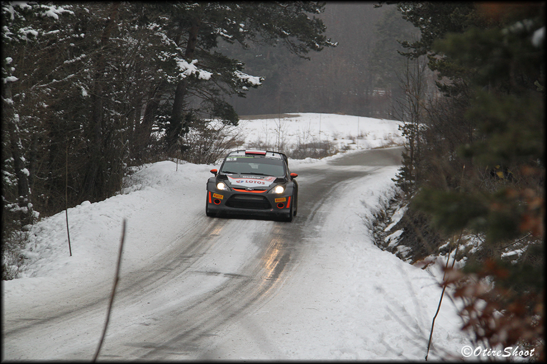 Robert Kubica Rajd Monte Carlo 2015